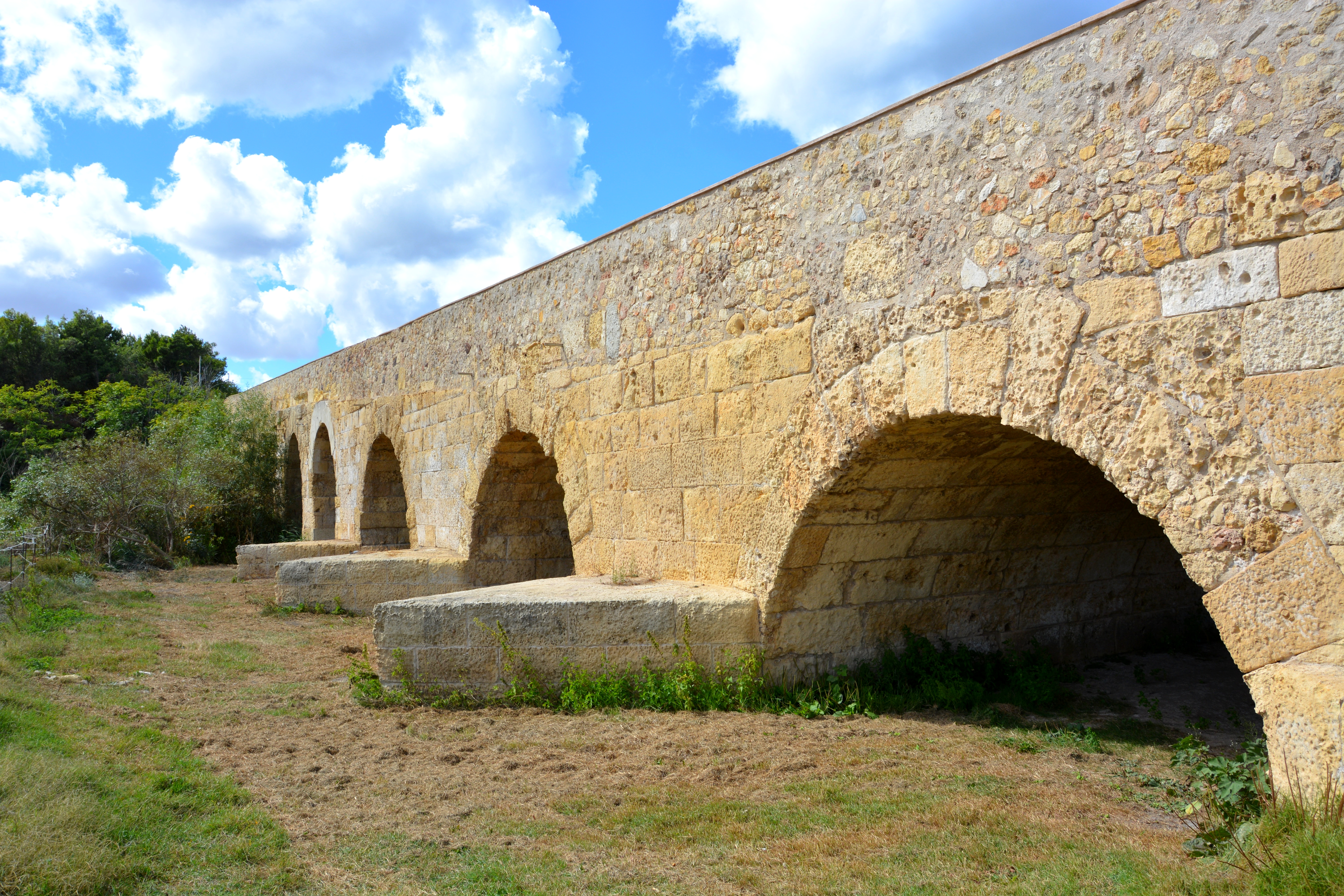 Ponte Romano sul Riu Mannu, vista degli speroni costruiti per la regolazione delle piene This is a photo of a monument which is part of cultural heritage of Italy.